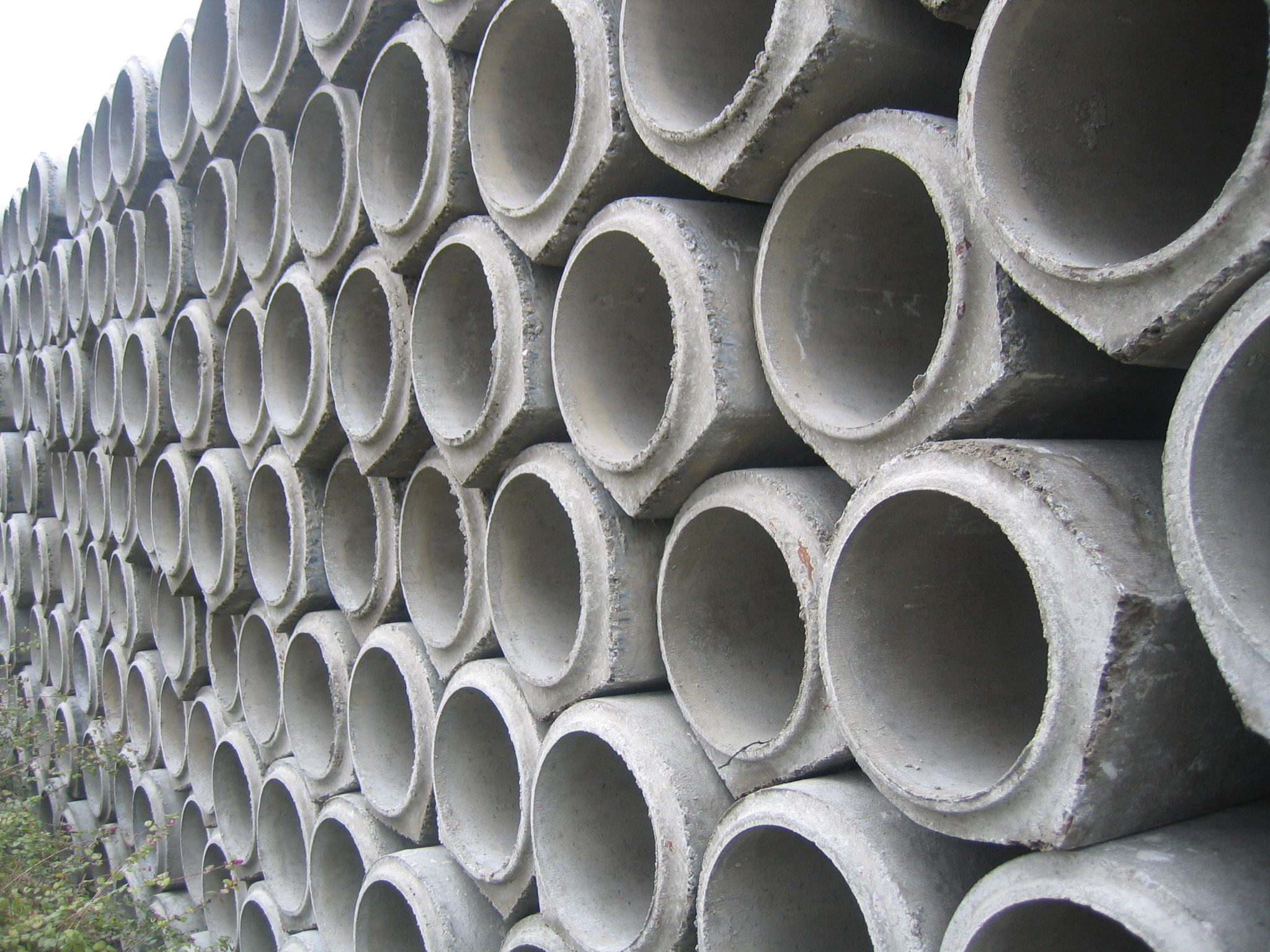 Rödinghausen-Bieren: Im Betonwerk Bieren werden Kanalelemente aus Beton hergestellt. Diese kleineren Exemplare lagern auf dem Betriebshof.